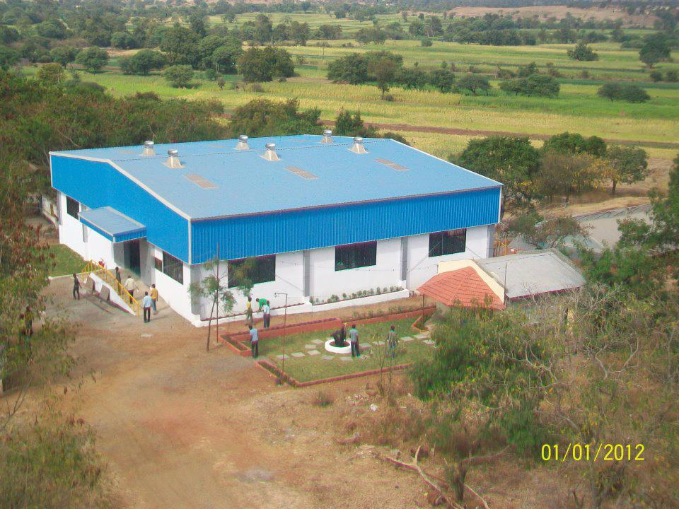 विज्ञान आश्रम वर्कशॉप